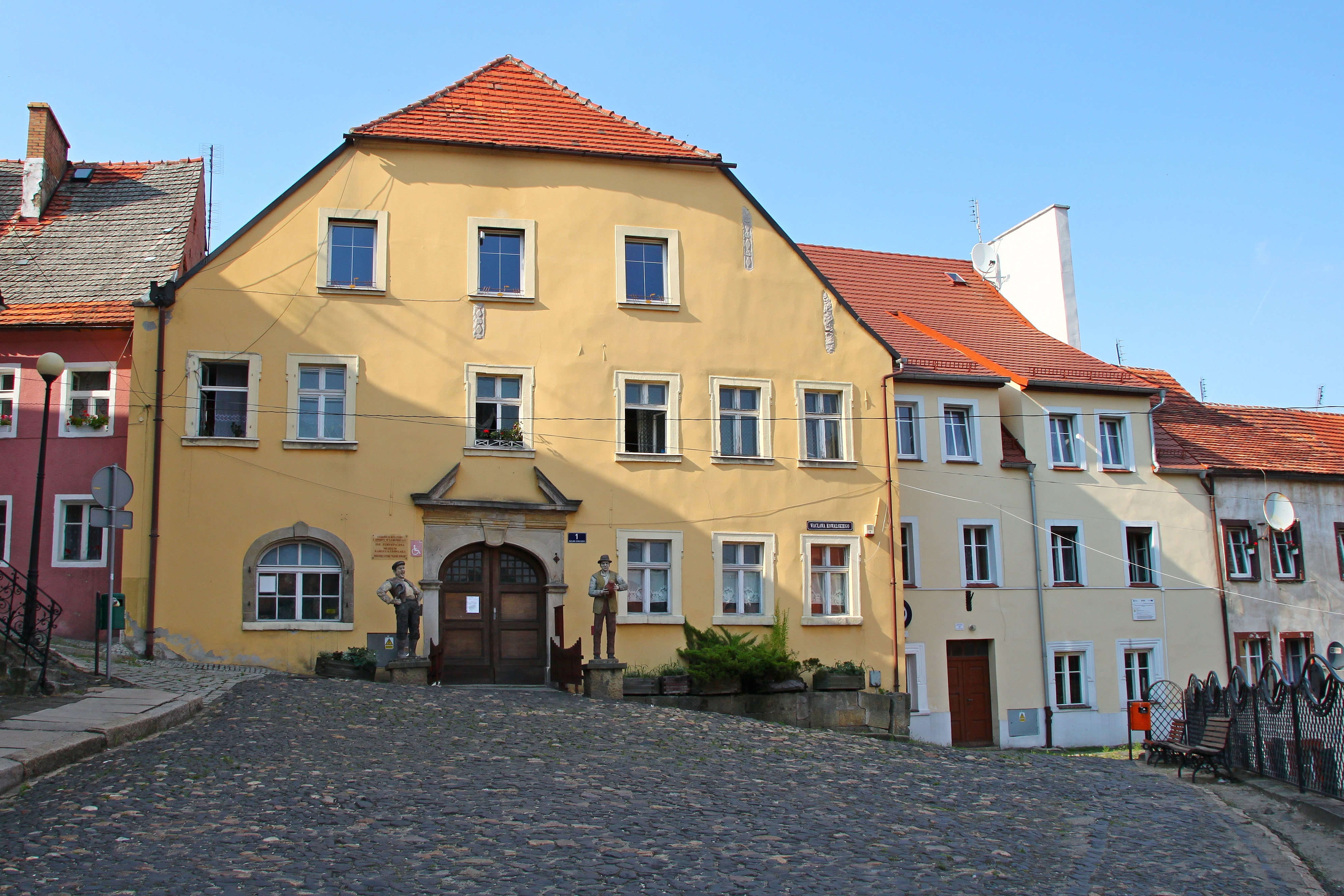 Lubomierz, d. Dom Płócienników – muzeum, XVI, 1700, pocz. XX